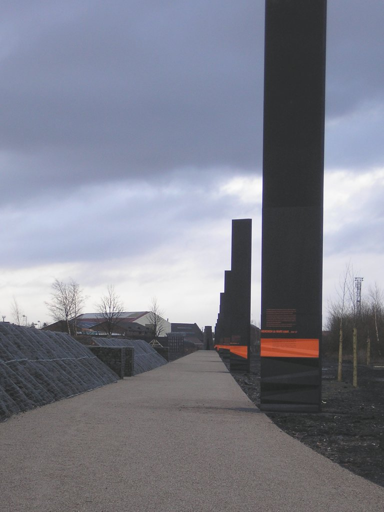 « Parcours des rescapés » symbolisant le cheminement des rescapés de la catastrophe du 10 mars 1906 jusqu'au puits de la fosse 2 de Billy-Montigny. Photo prise par moi-même lors de l'inauguration le 10 mars 2006. Merci de préciser les auteurs du Parcours des Rescapés : Paysagistes : territoires, sites et cités; Scénographie et signalétique : VRIGNAUD Nicolas & Jean-Marc LOUAZON; BET: Maning. VRIGNAUD Nicolas